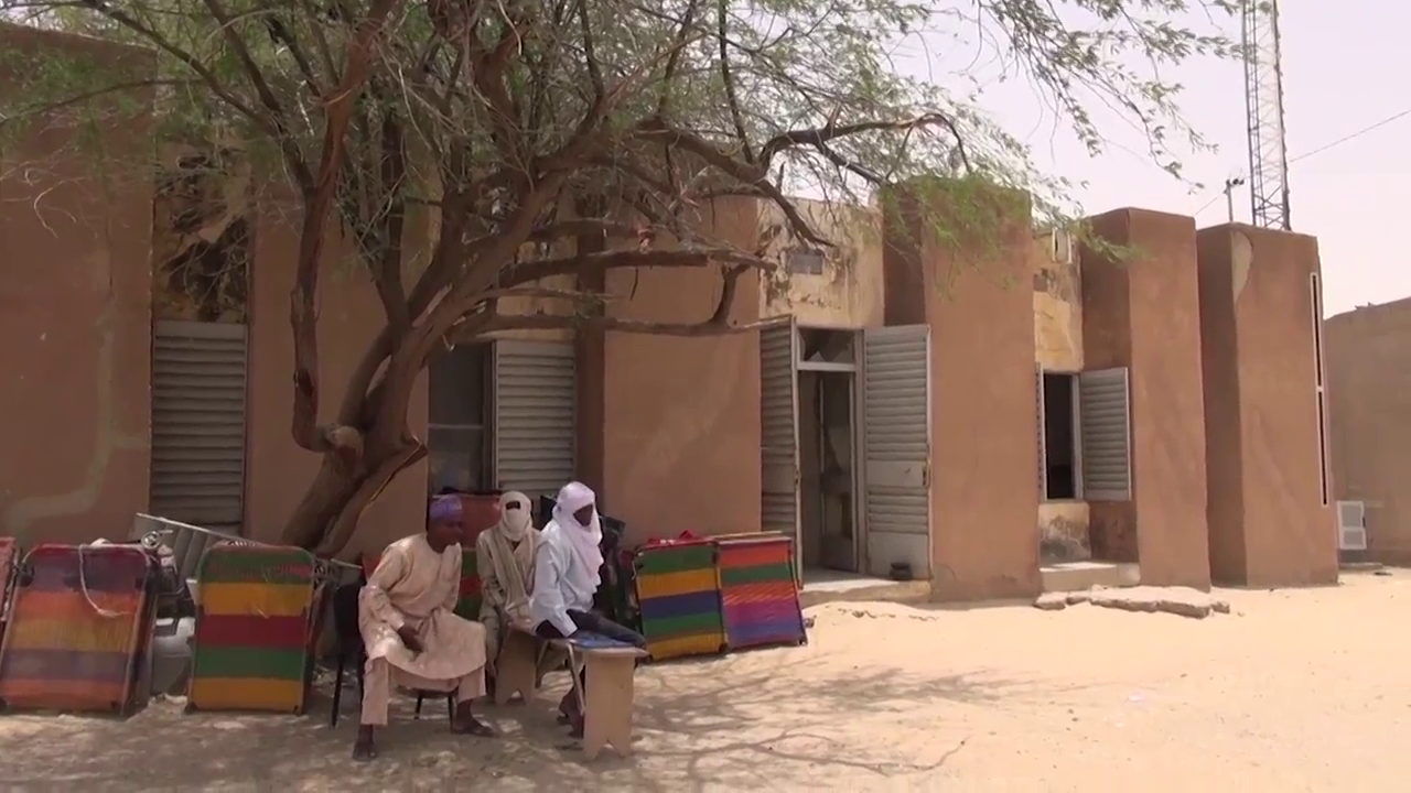 La cour de la préfecture de Bosso, au Niger, mi-avril 2017